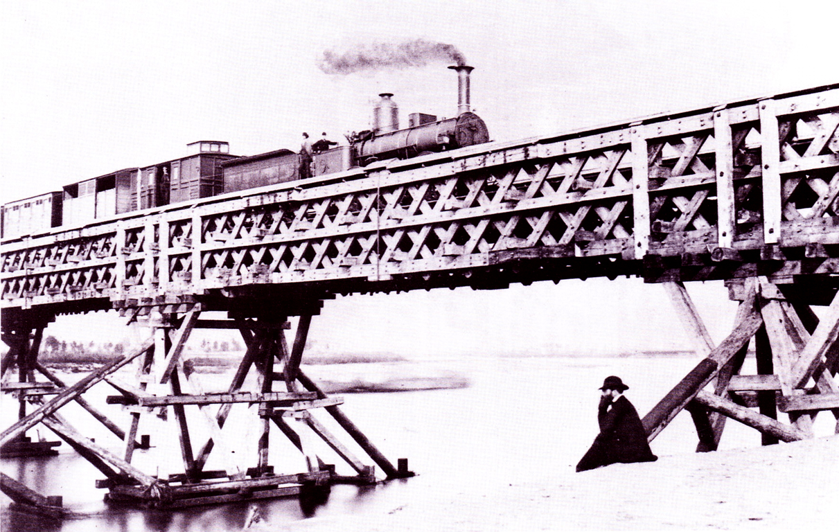 Ponte ferroviario di Piacenza, provvisorio, in legno, esistito dal 1861 al 1865